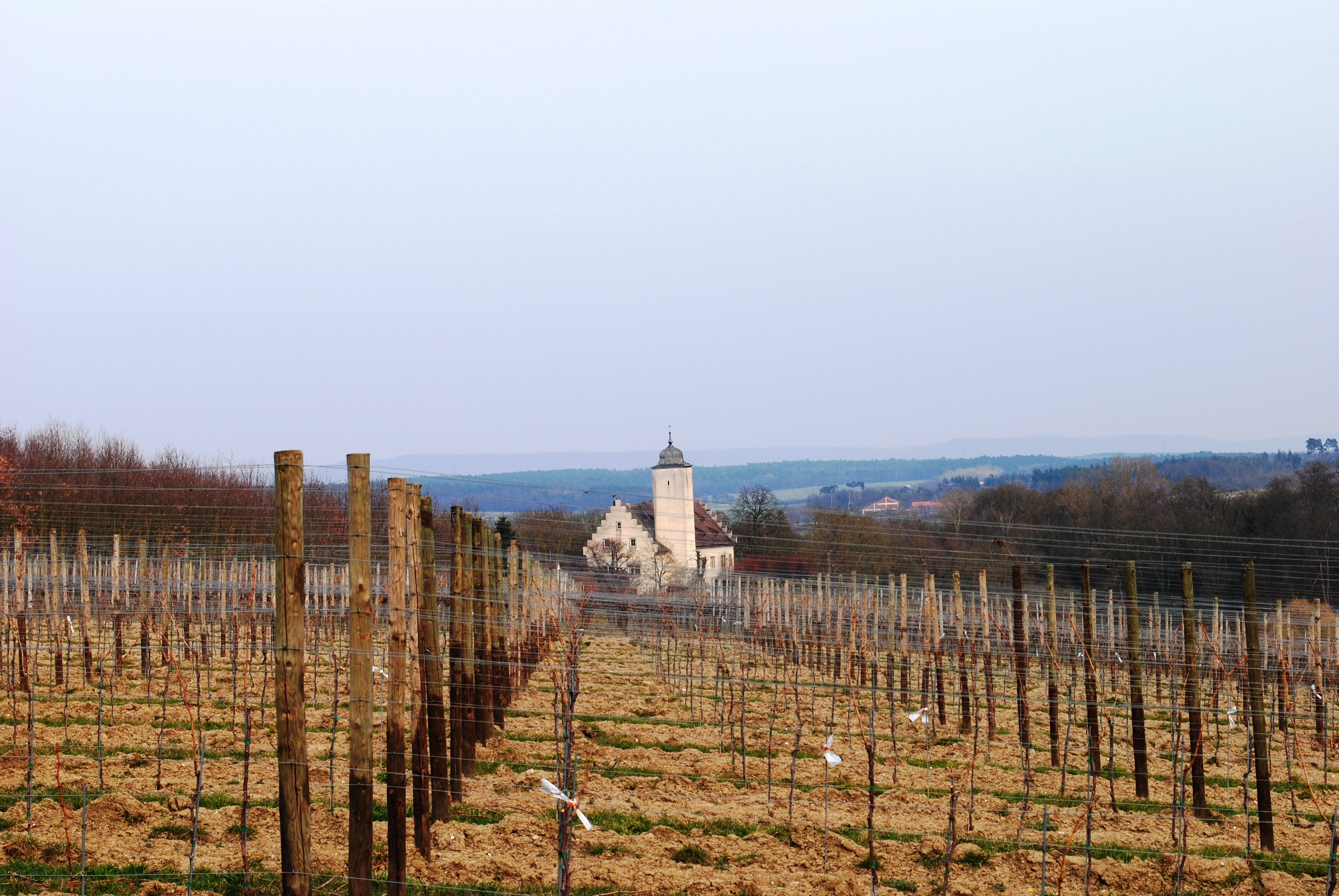 Hallburg, Rückansicht, Volkach, mit ovalem Bering, Bergfried 13./14. Jh., Wohntrakt zweigeschossiger Satteldachbau mit Staffelgiebel, unter Verwendung älterer Bauteile im 16. Jh. erbaut; Burgkapelle St. Pankratius, um 1400.